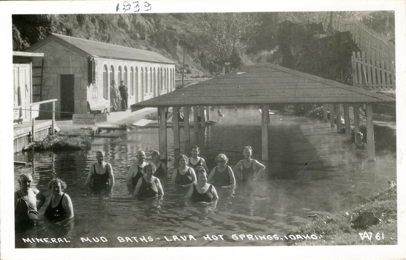 Lava Hot Springs in 1939